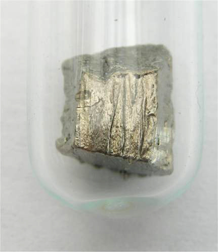 neodymium Bildbeschreibung: Neodym unter Argongas Quelle: Foto aus meiner Elementesammlung Fotograf: Tomihahndorf Datum: März 2006